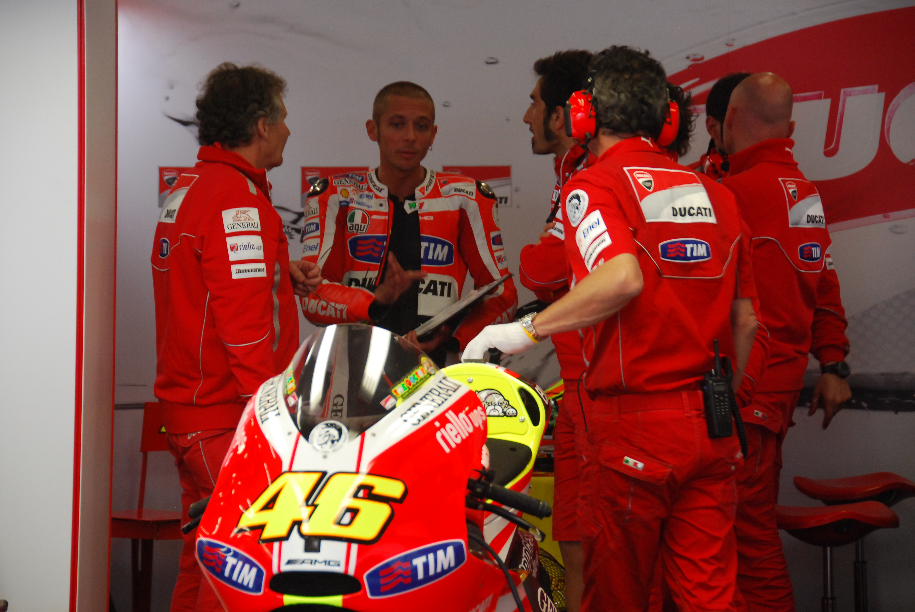 Le pilote italien Valentino Rossi, lors des essais libres, le 30 avril 2011, sur le circuit d'Estoril, au Portugal.